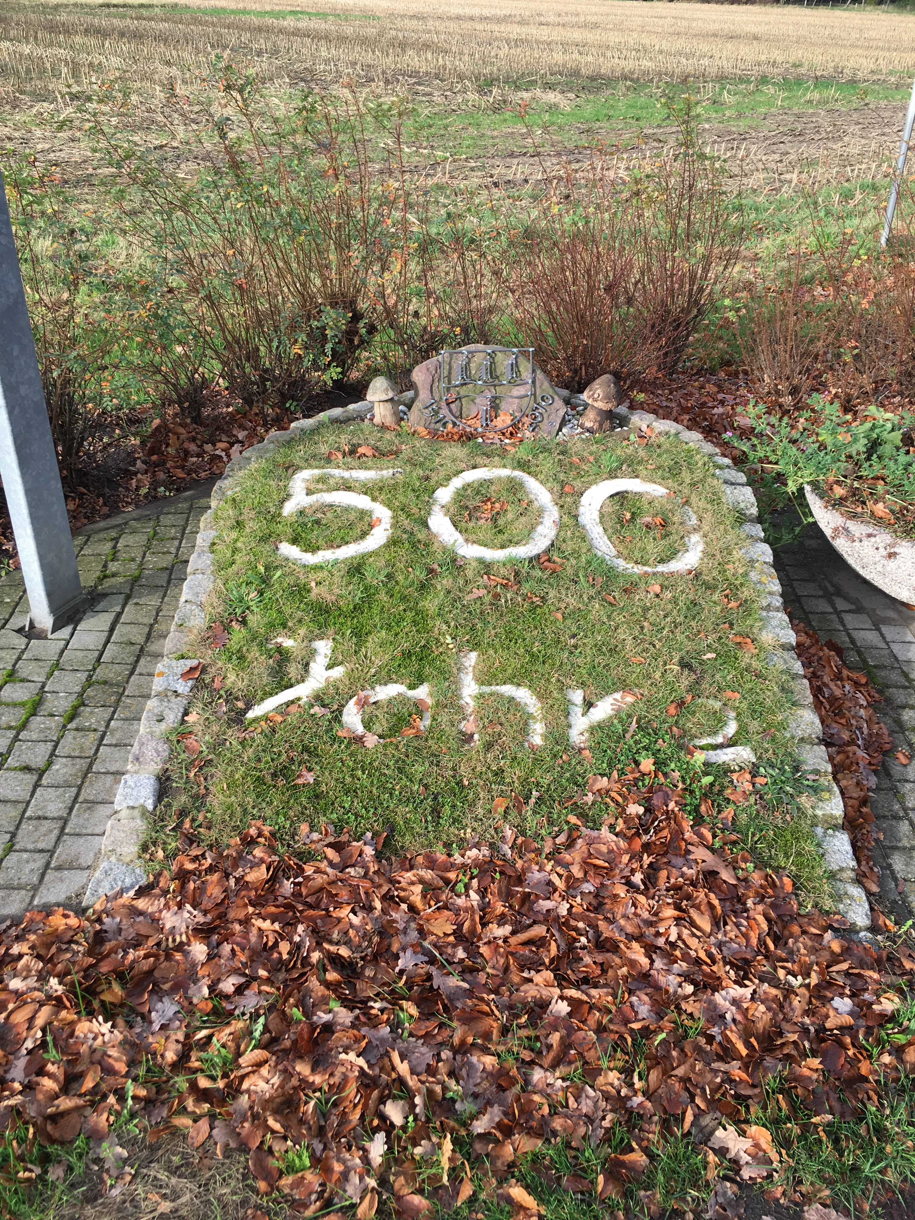 lüttje Anlaag to dat 500-Johr-Jubiläum von Langeln